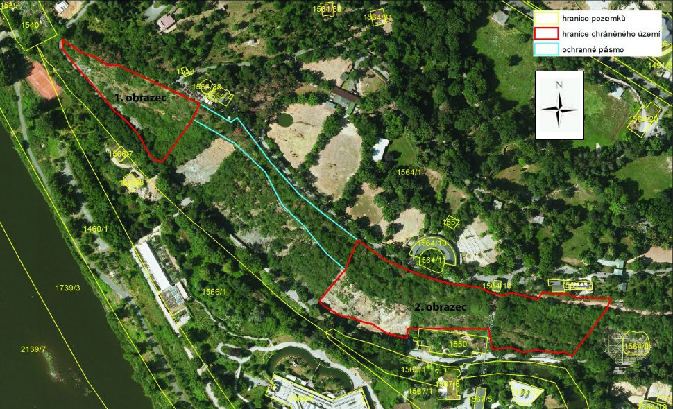 Orientační grafické znázornění území přírodní památky Skály v zoologické zahradě a jejího ochranného pásma.